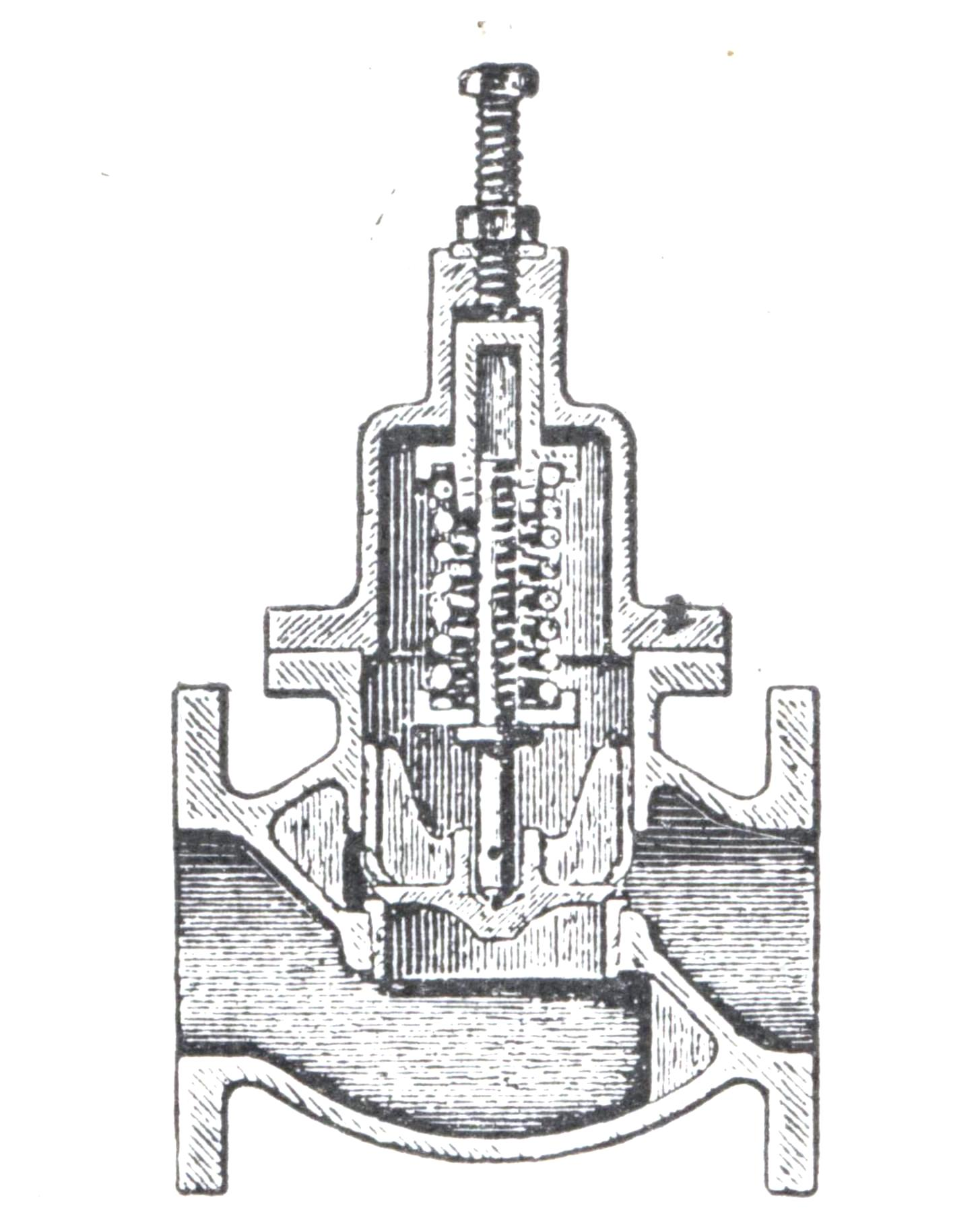 Schnëttduerch e Sécherheetsventill.